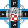 17 Ruchome Warsztaty Techniczne w Poznaniu